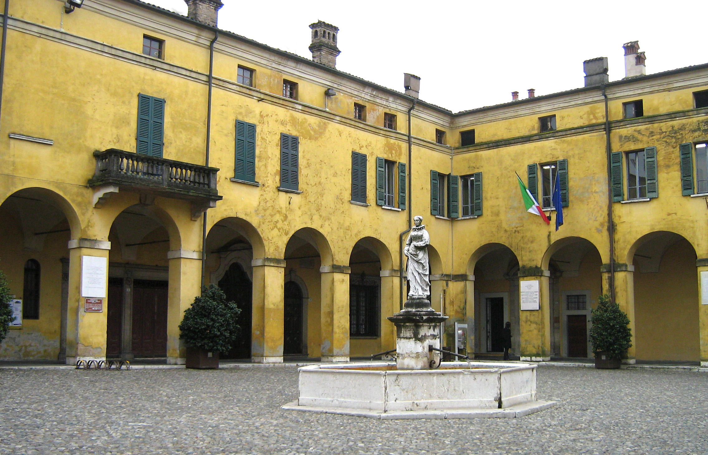 Castiglione delle Stiviere, Piazza Dallò.